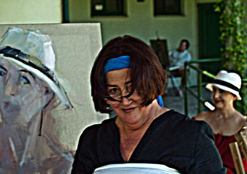 III encontros de pintura e poesÍa de Culleredo 2010. Retrato de María Manuela.